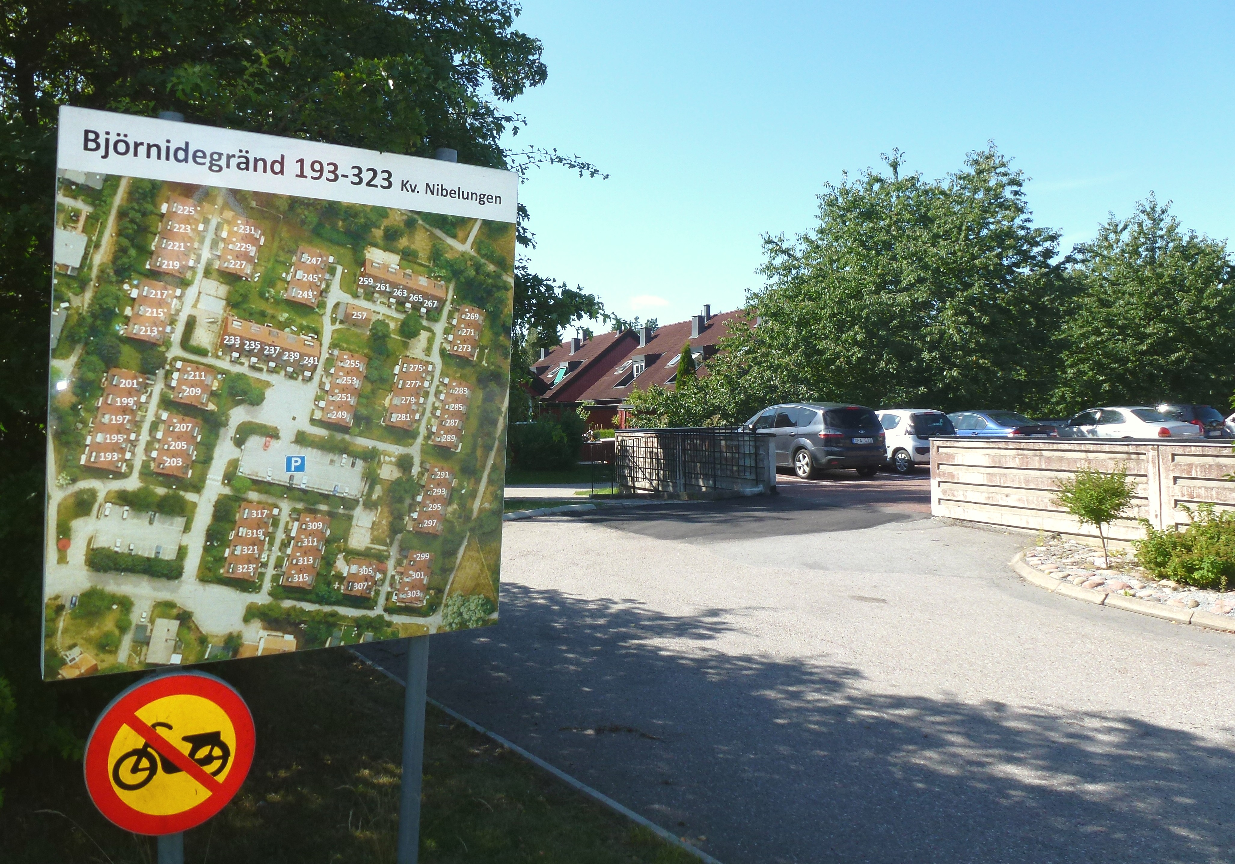 Småhusbebyggelse i Kälvesta Björnidevägen